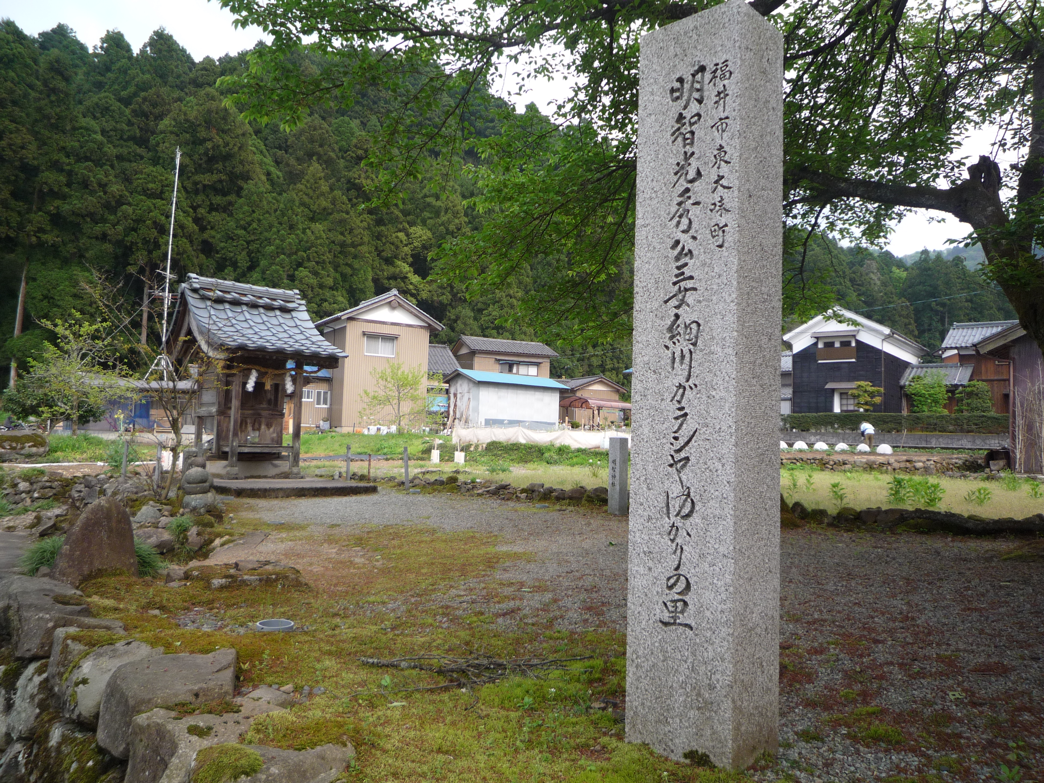 細川ガラシャゆかりの里 明智神社